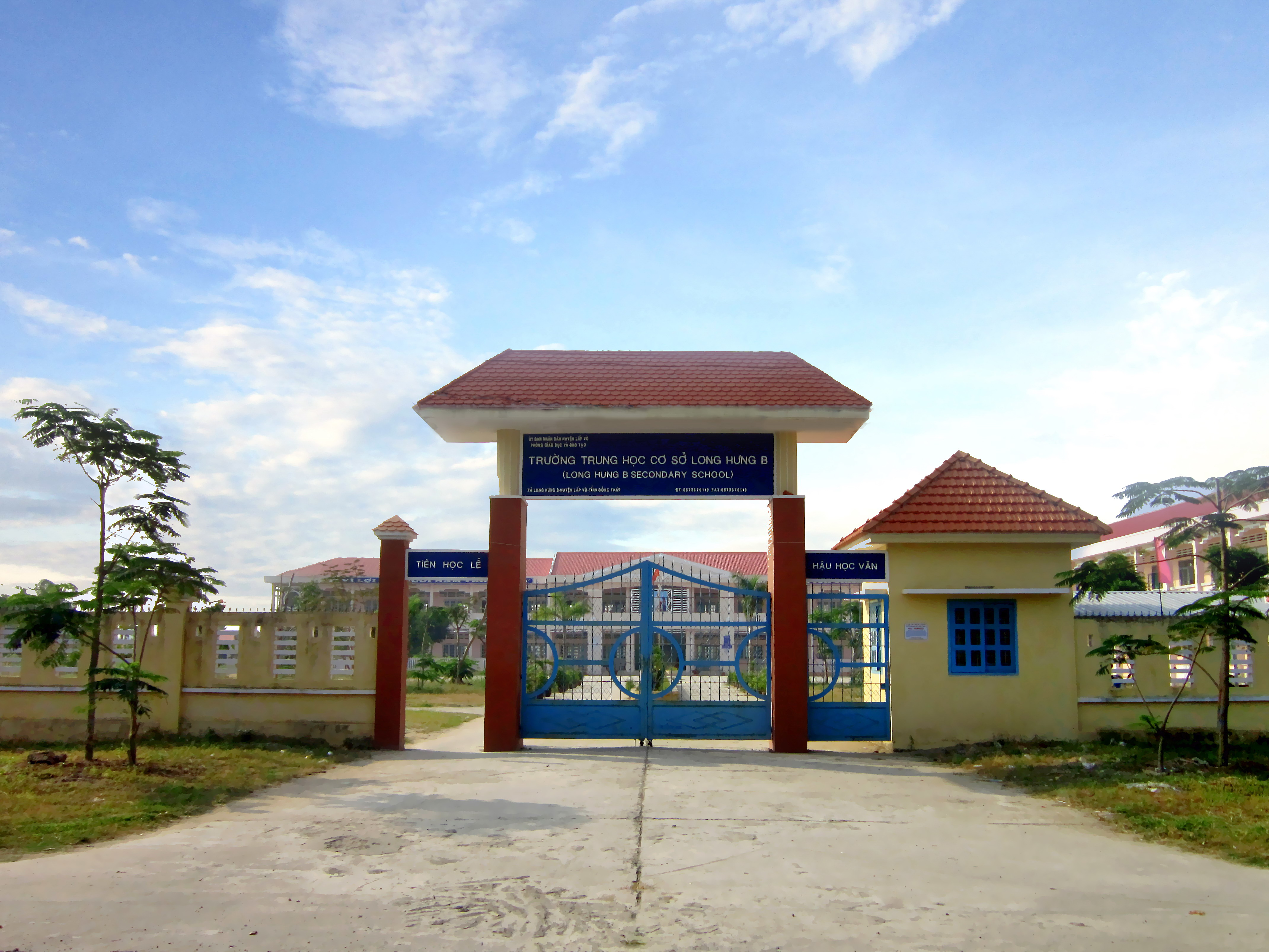 Trường PTCS Long Hưng B, huyện Lấp Vò, Đồng Tháp, Việt Nam..